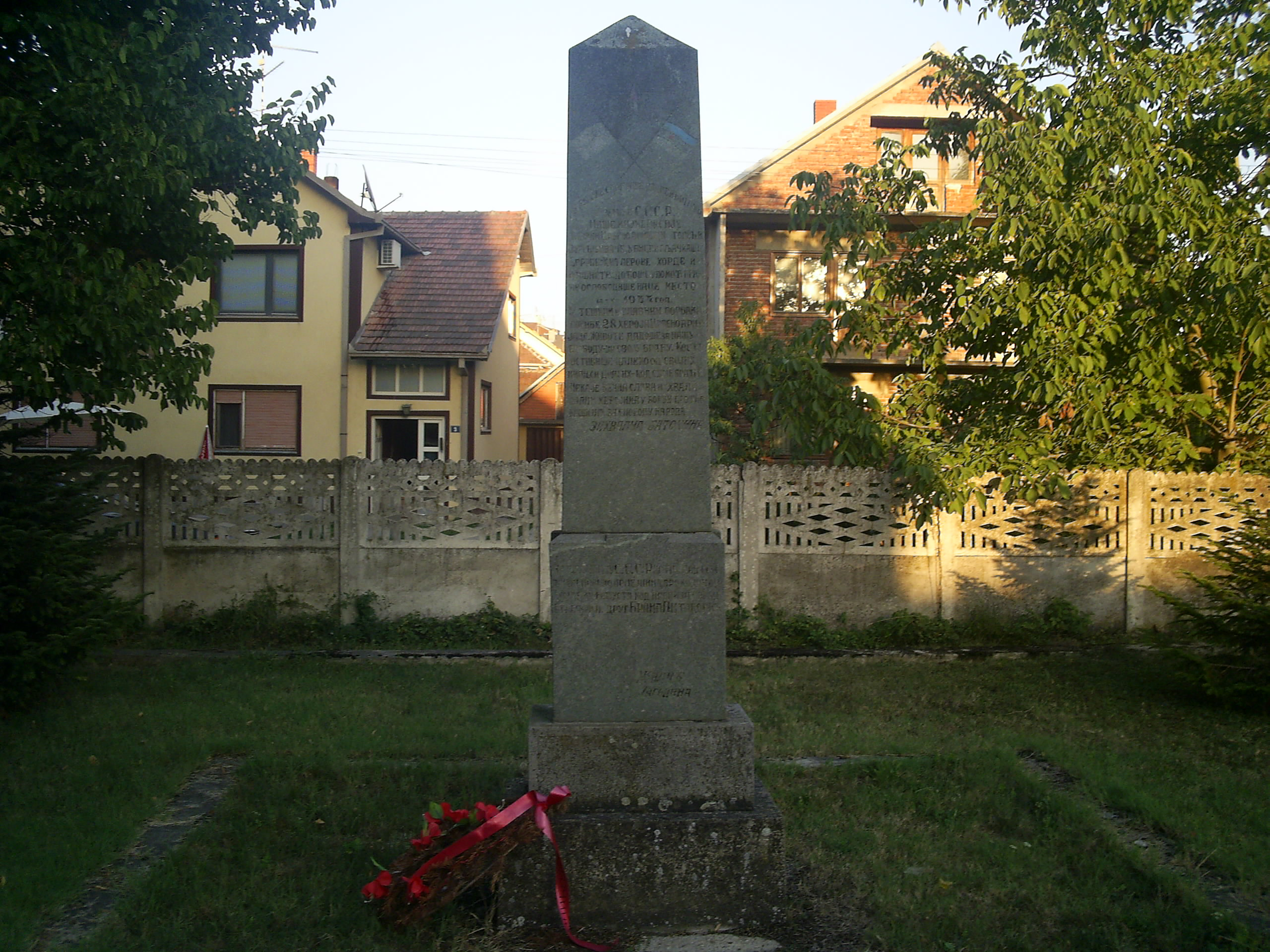 Споменик погинулим војницима црвене армије у Баточини